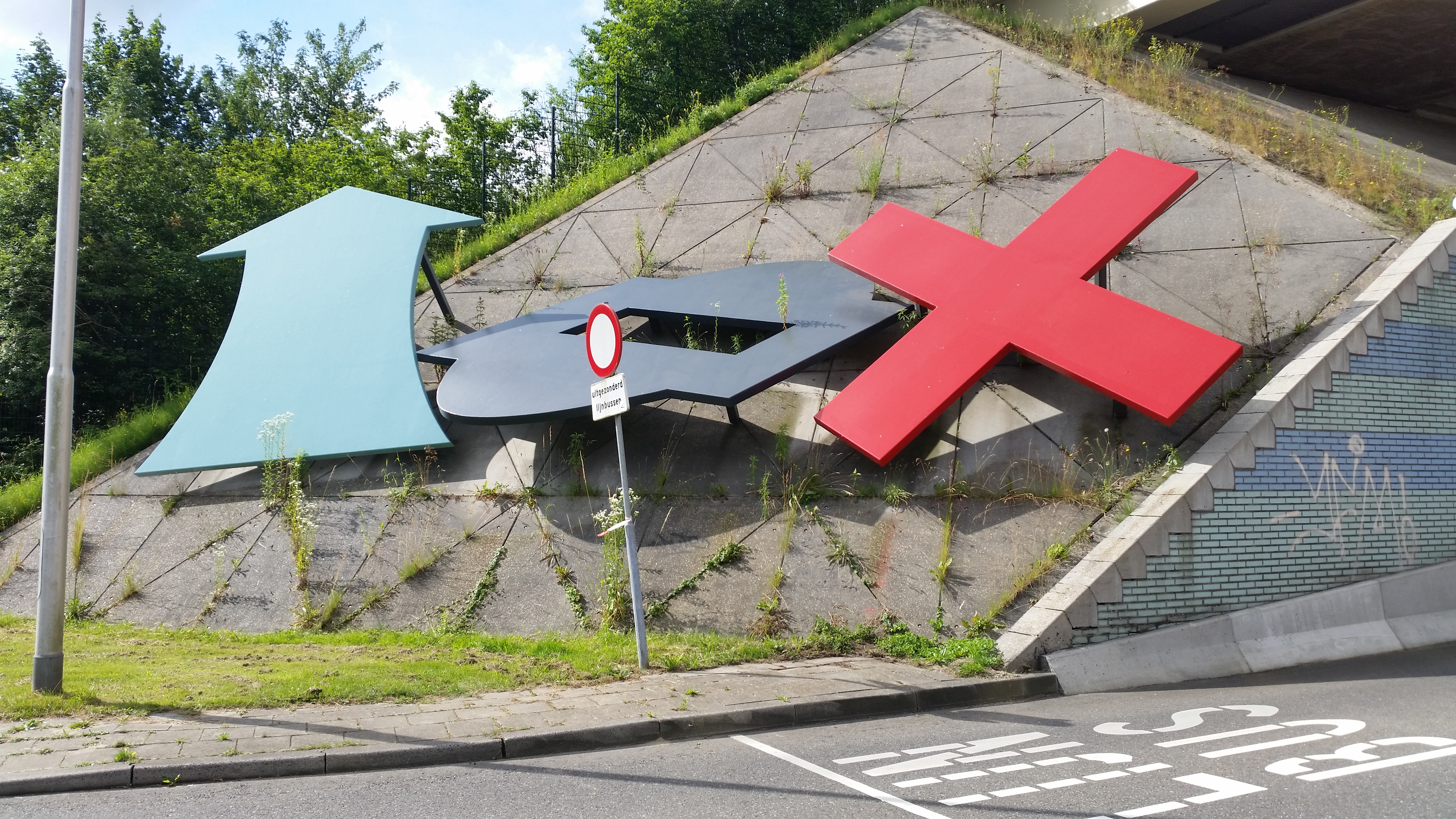 Zesdelig kunstwerk van Han Schuil bij Station Duivendrecht